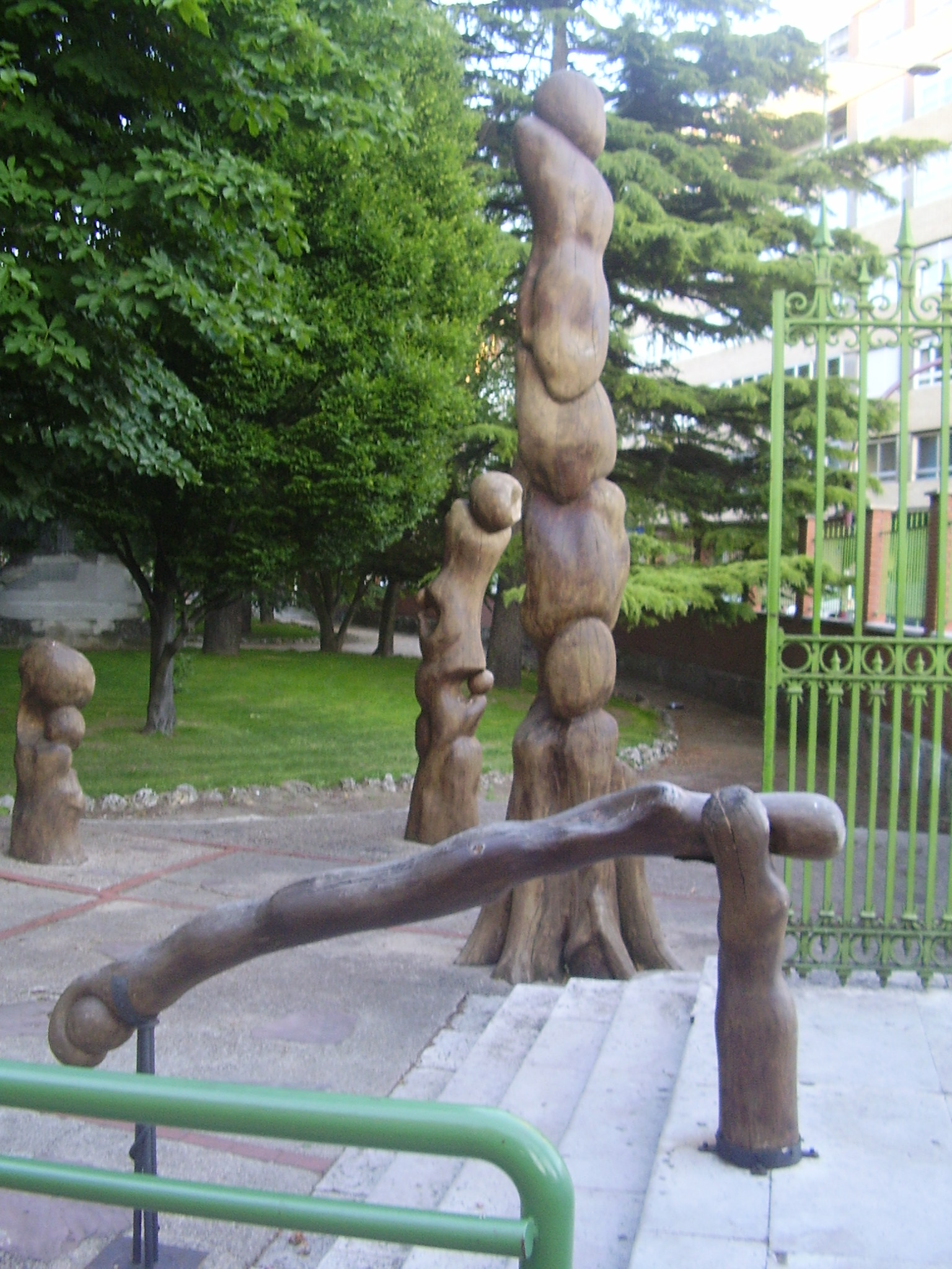 Grupo escultórico realizado por Teo Calvo en madera de Olmo, 1994. Huerta de Guadián, Palencia.